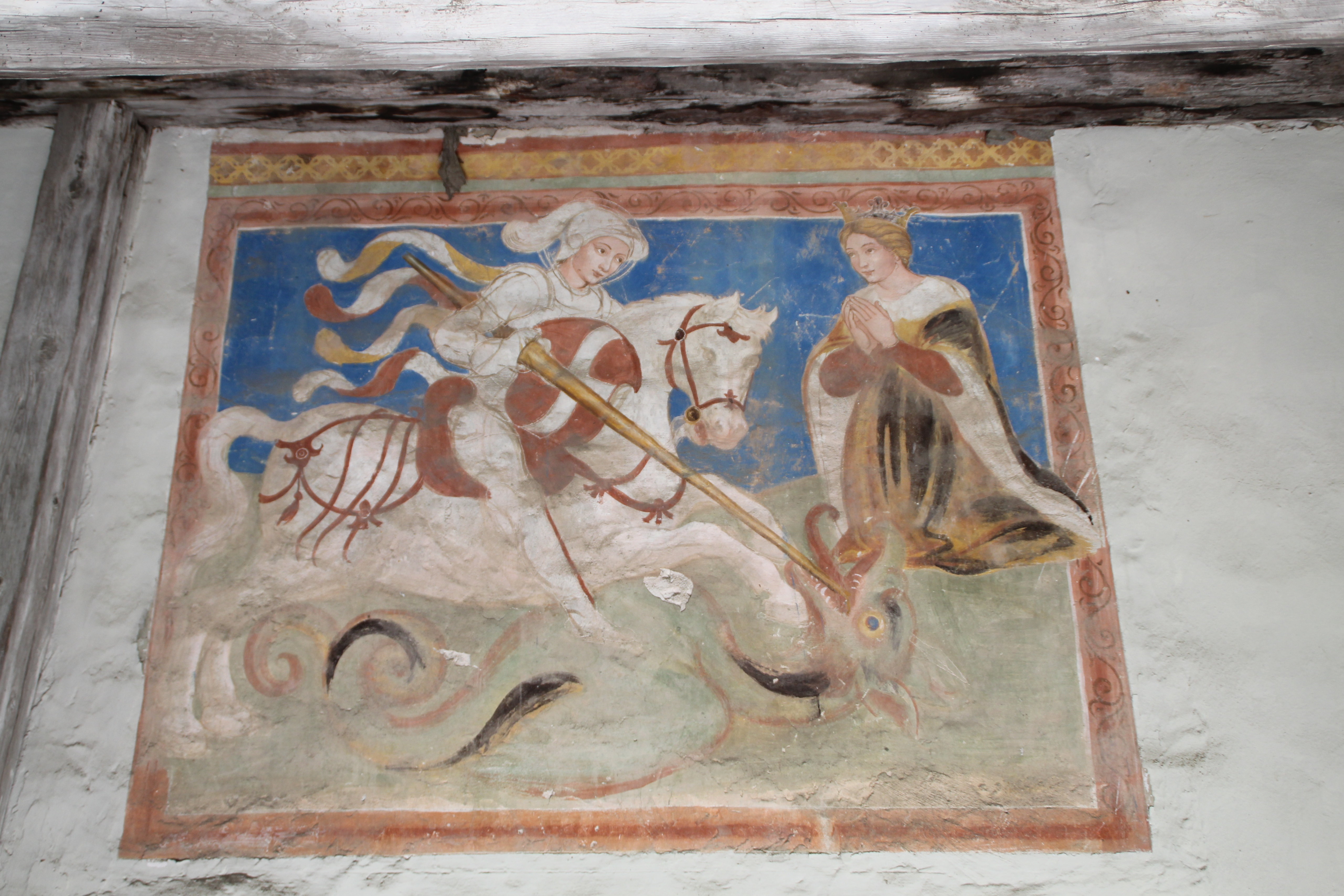 Prato (Leventina) Pfarrkirche San Giorgio: Bild St. Georg im Vorraum